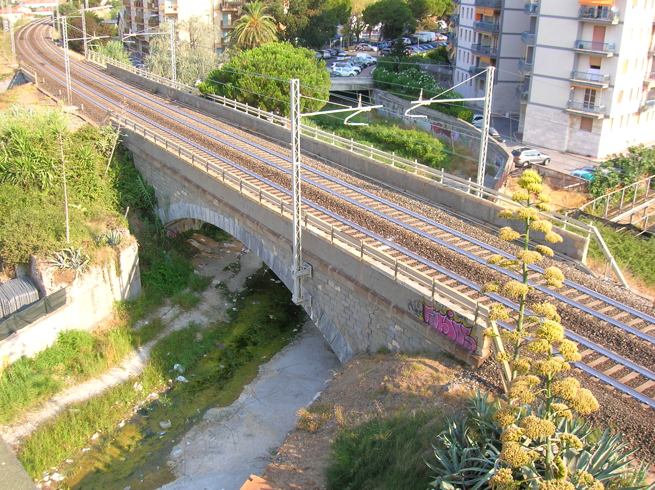 Vallecrosia, Liguria, Italia.